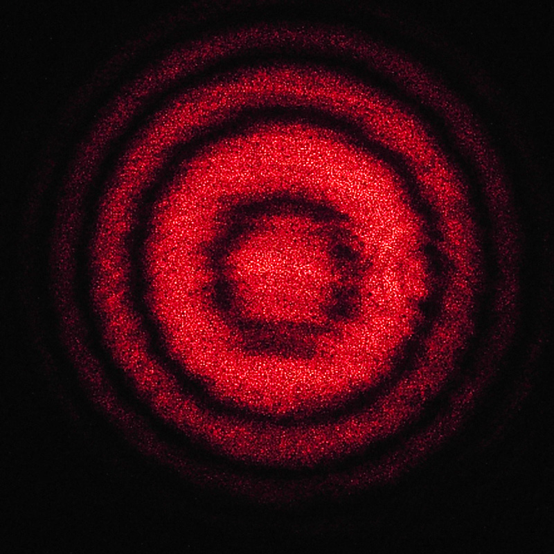 Interferenzringe nach einem Michelson-Interferometer (HeNe-Laser, 633nm)